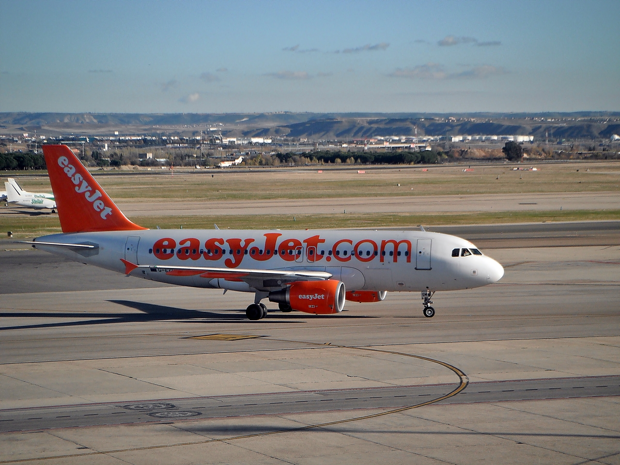 Airbus A319 de Easyjet en el aeropuerto de Madrid-Barajas